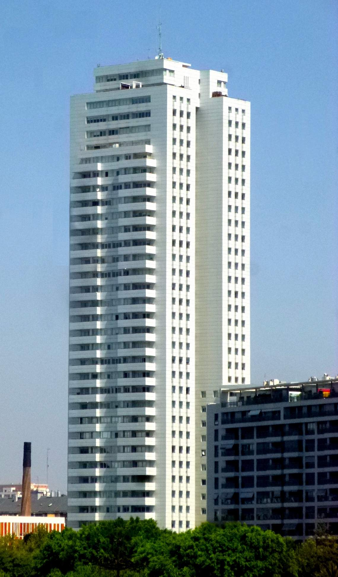 Torre de Francia (Valencia)